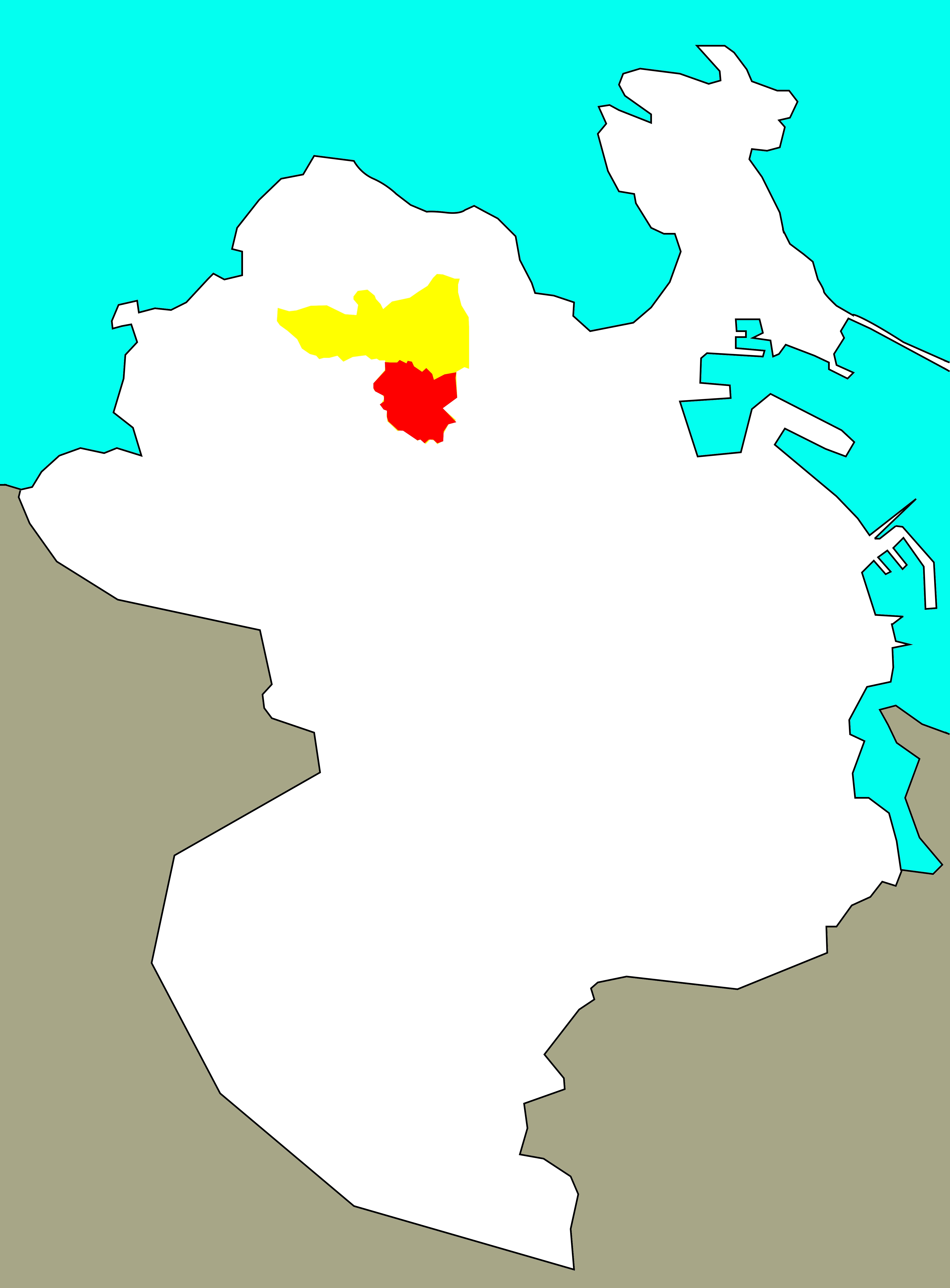 Situación da Gramela no "barrio-territorio" de San Pedro de Visma.[1]